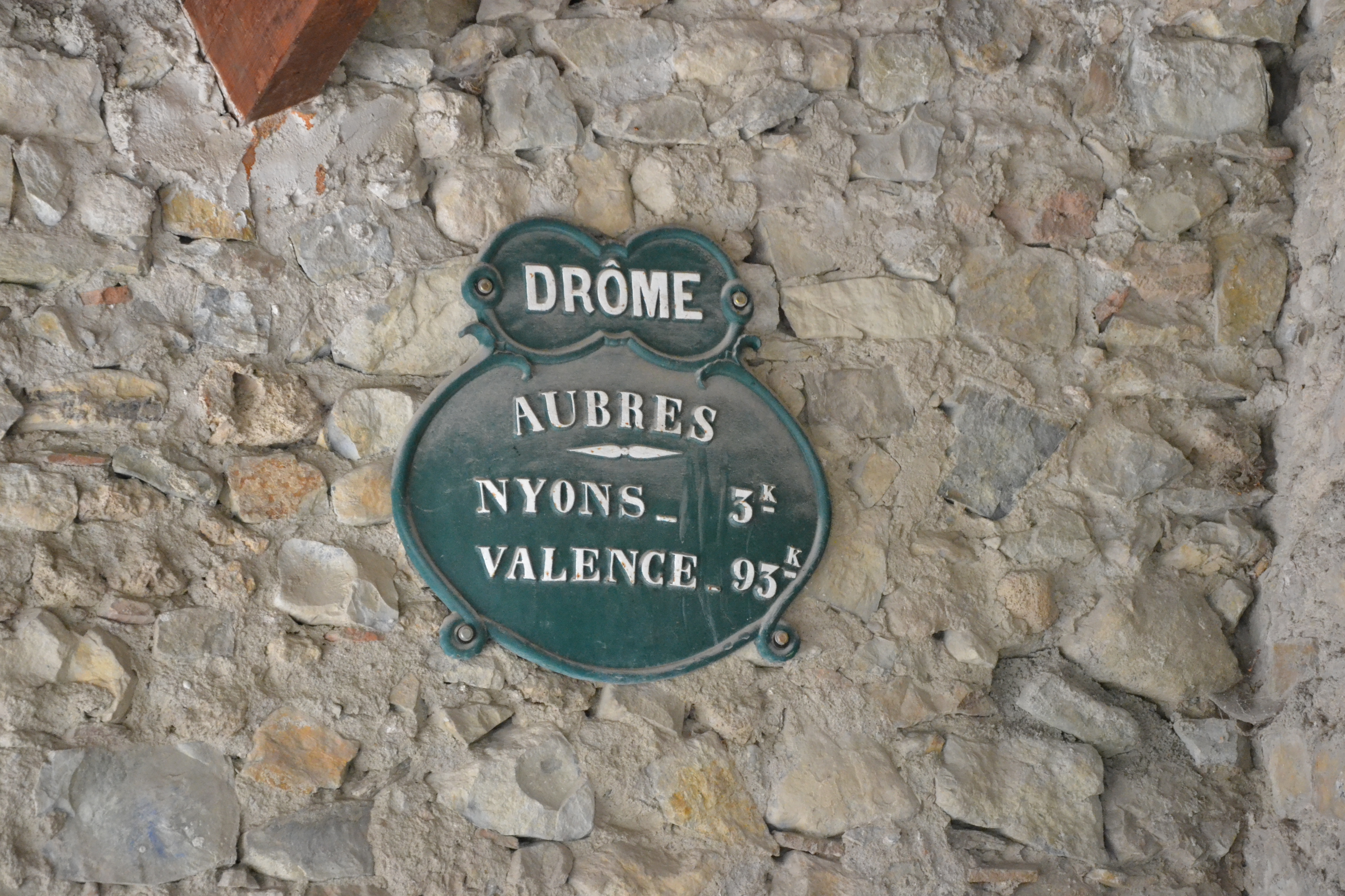 panneau indicateur, au viel Aubres